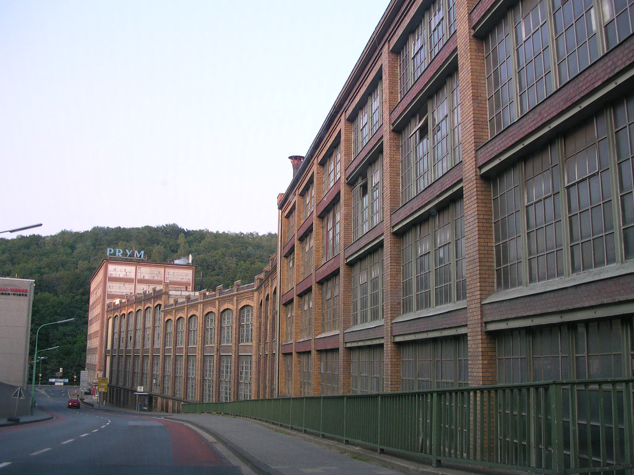 Stolberg, “Prym”-Fabrikanlage an der Finkensiefstraße